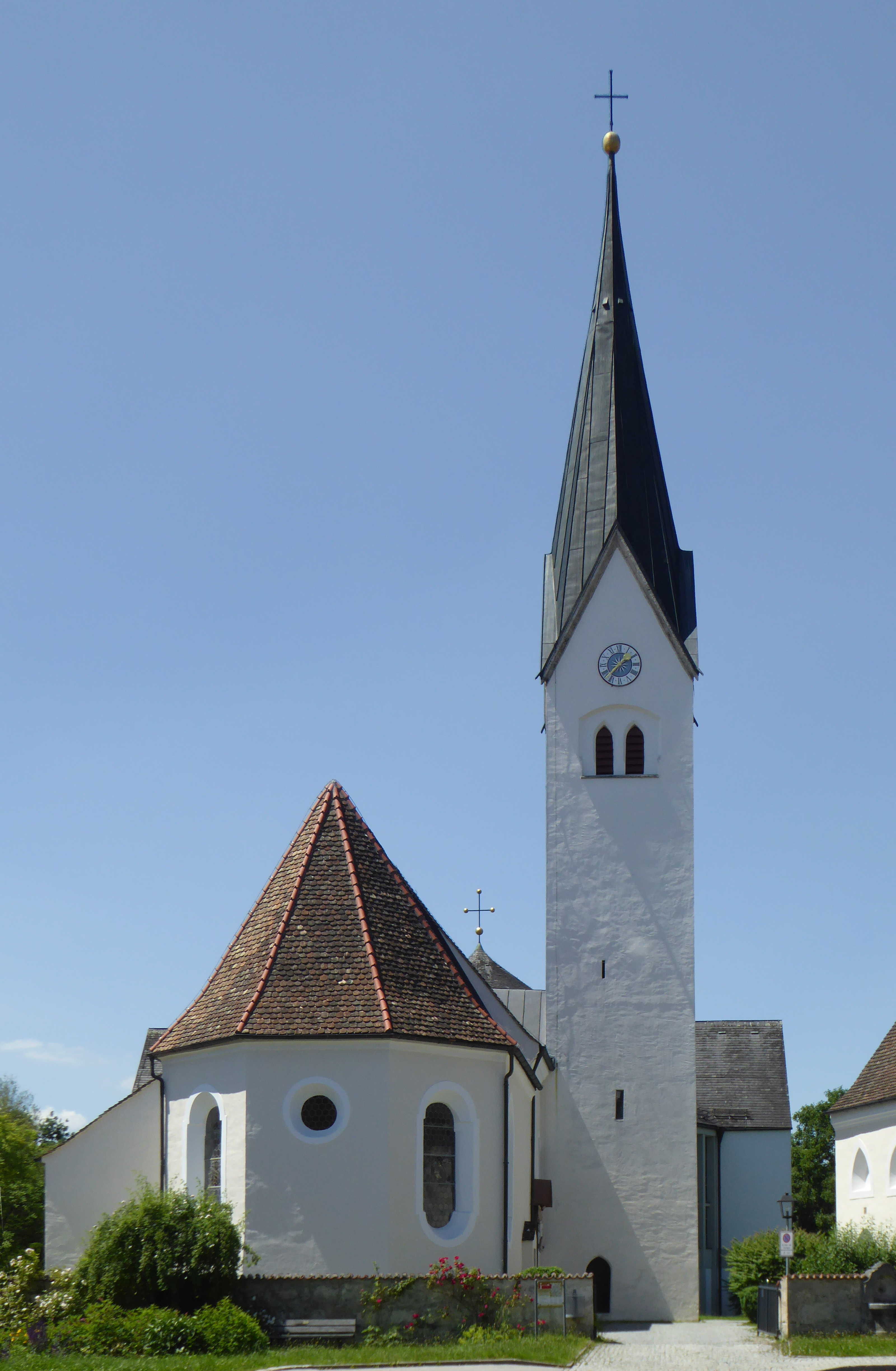 Weilheim in Oberbayern, Stadtpfarrkirche St. Hippolyt in St. Pölten, von Osten gesehen.